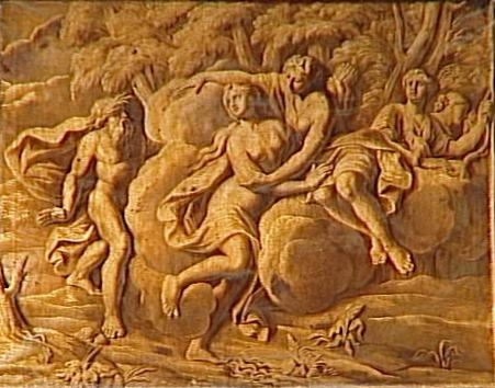 DIANE PROTEGEANT ARETHUSE CONTRE LE FLEUVE ALPHEE ; Salon : Salon de Diane, Grands appartements du Château de Versailles Emplacement : dessus-de-porte